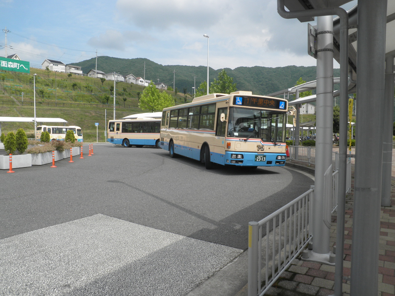 箕面森町線の車両